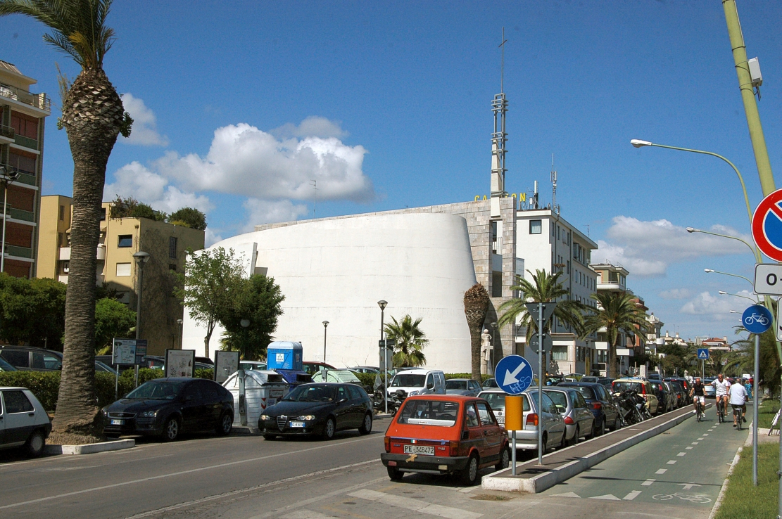 Pescara